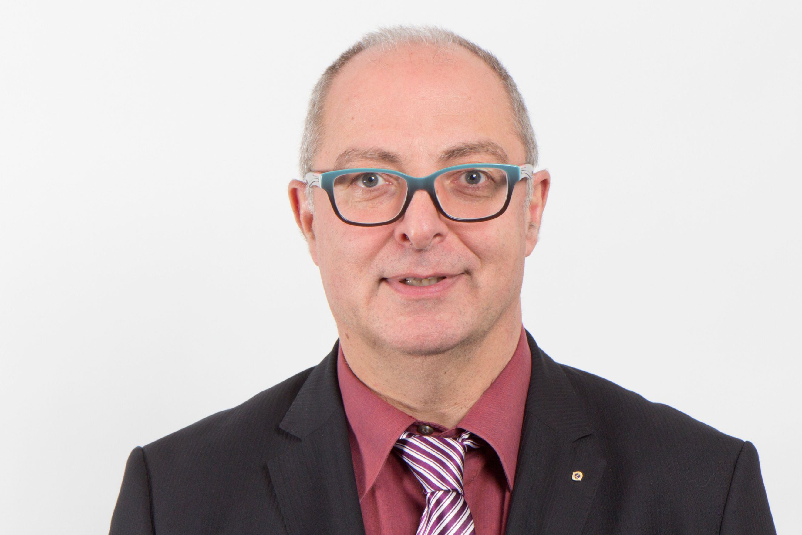 Ulf Gundlach (* 21. November 1957 in Nienburg/Weser) ist ein deutscher politischer Beamter. Er ist seit 2011 Staatssekretär im Innenministerium des Landes Sachsen-Anhalt. Wikipedia im Landtag – Sachsen-Anhalt 13./14. Dezember 2012 in MagdeburgDieses Foto wurde im Rahmen des Projektes „Wikipedia im Landtag“ erstellt. The making of this document was supported by the Community-Budget of Wikimedia Germany. The making of this work was supported by Wikimedia Austria. For other files made with the support of Wikimedia Austria, please see the category Supported by Wikimedia Österreich. Personality rights warningAlthough this work is freely licensed or in the public domain, the person(s) shown may have rights that legally restrict certain re-uses unless those depicted consent to such uses. In these cases, a model release or other evidence of consent could protect you from infringement claims.